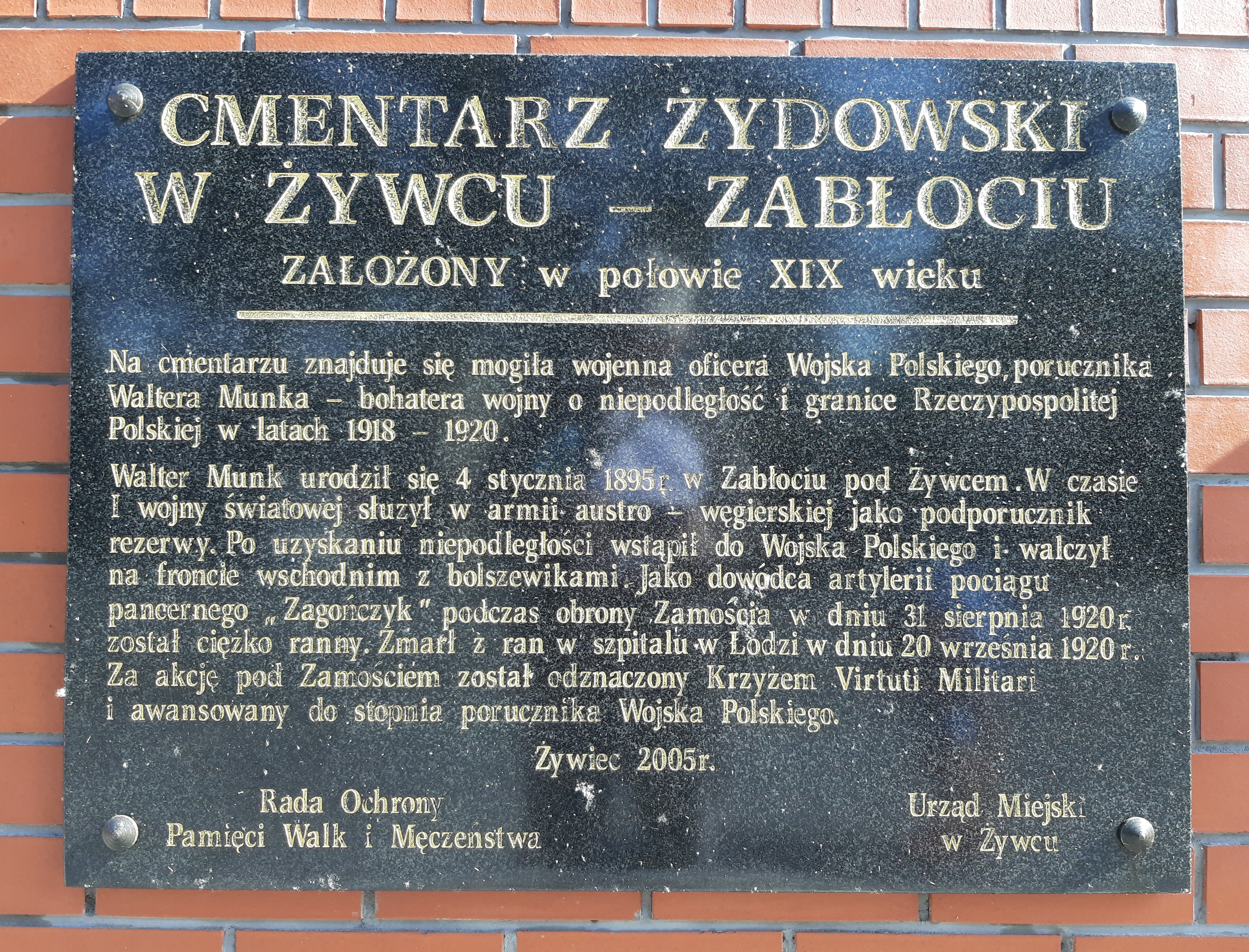 Żywiec cmentarz żydowski 2019